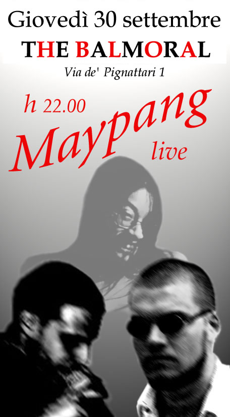 Maypang promo